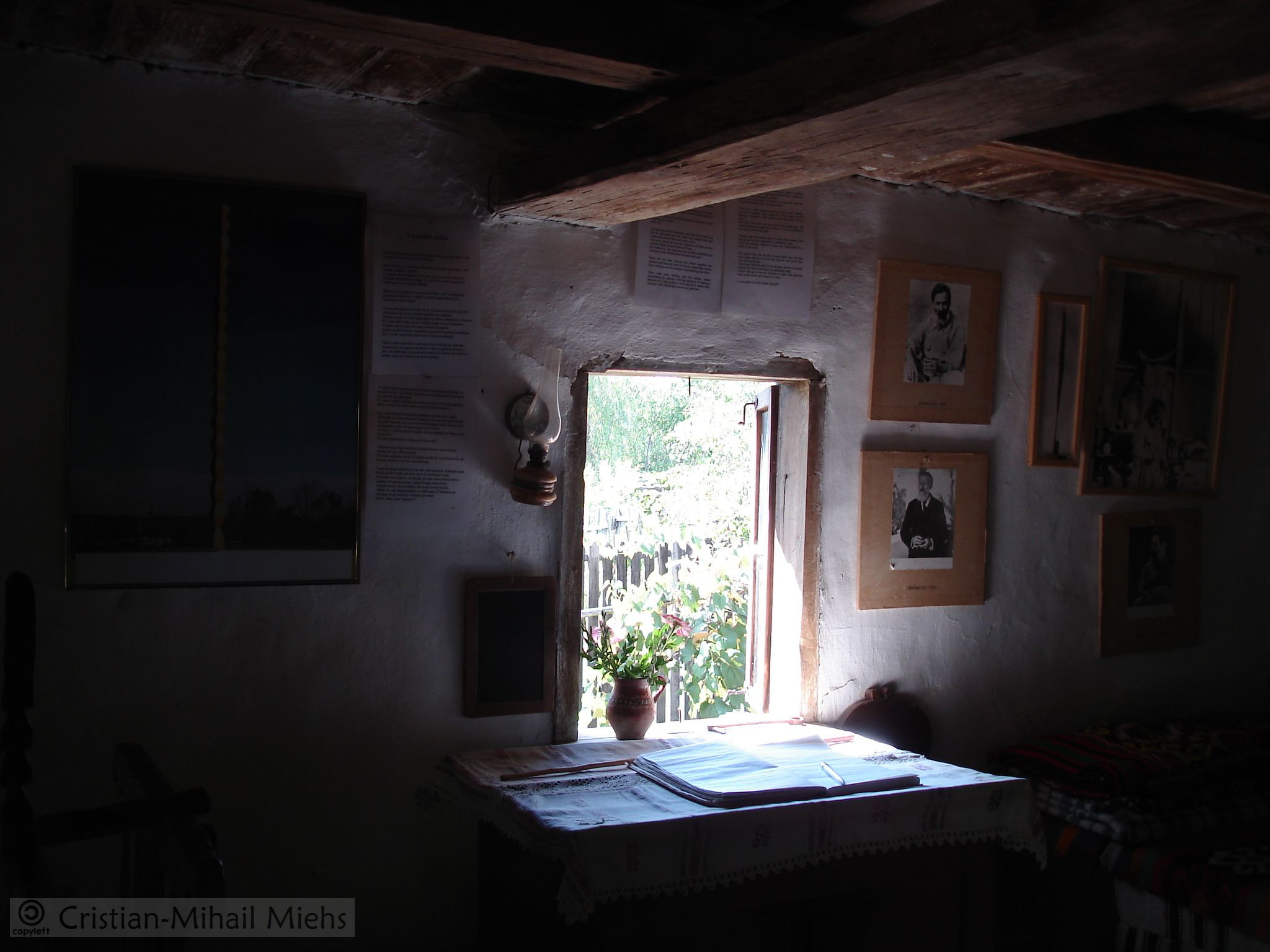 Casa-muzeu Constantin Brâncuşi - interior